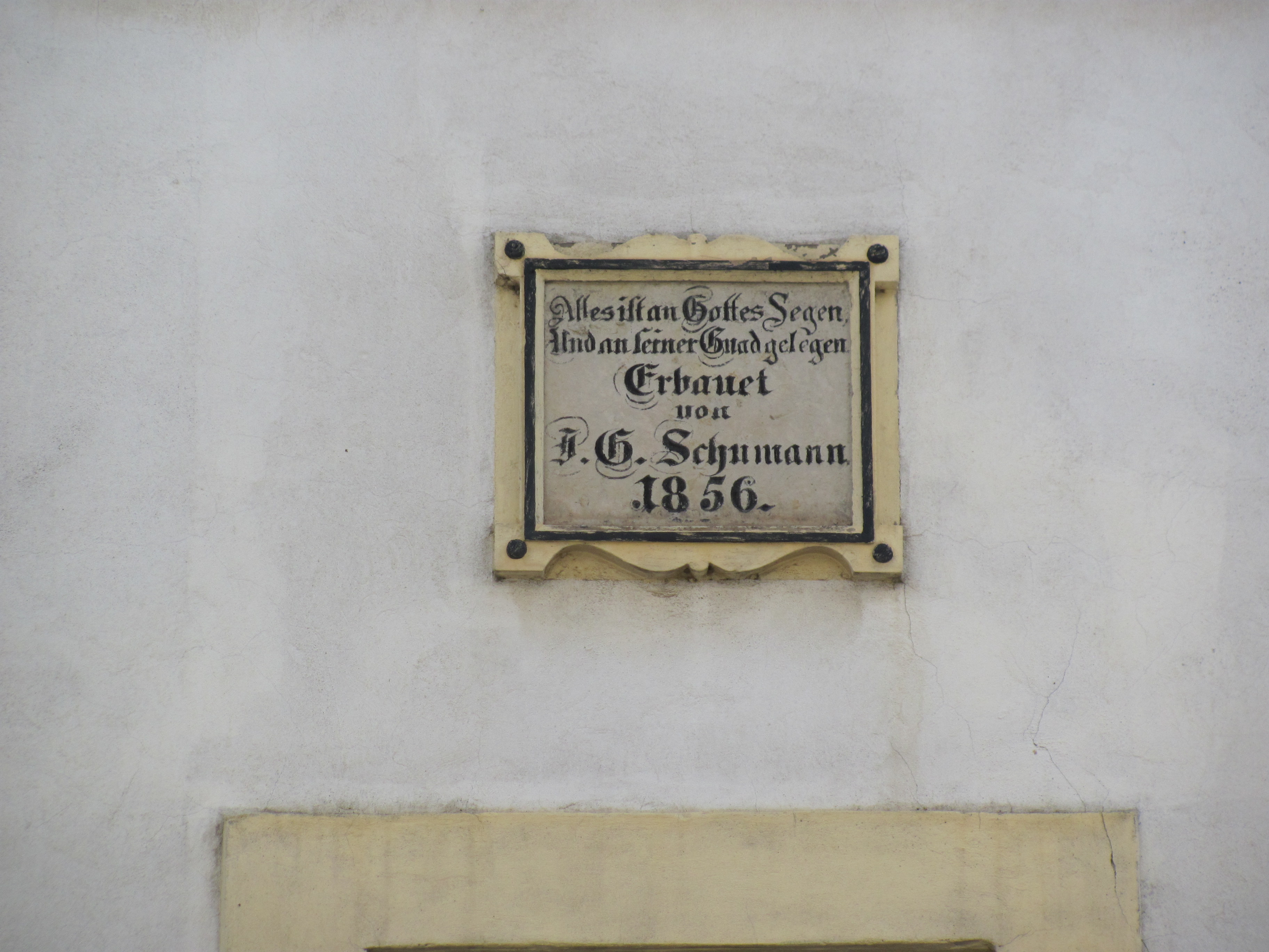 Radebeul Dreiseithof Altserkowitz 1 Spruch